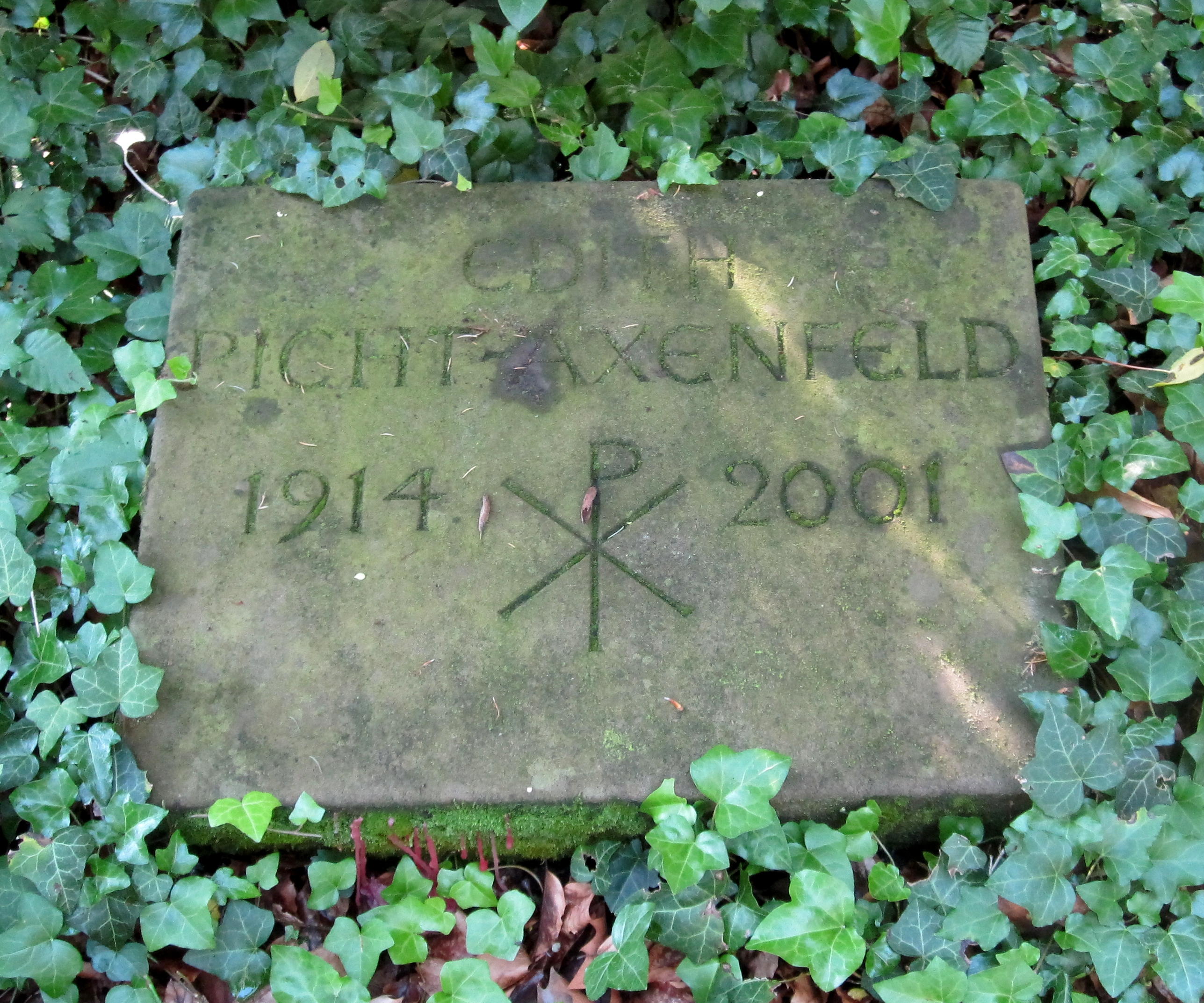 Grab Edith Picht-Axenfeld auf dem Hauptfriedhof Freiburg im Breisgau, Grabfeld 57c